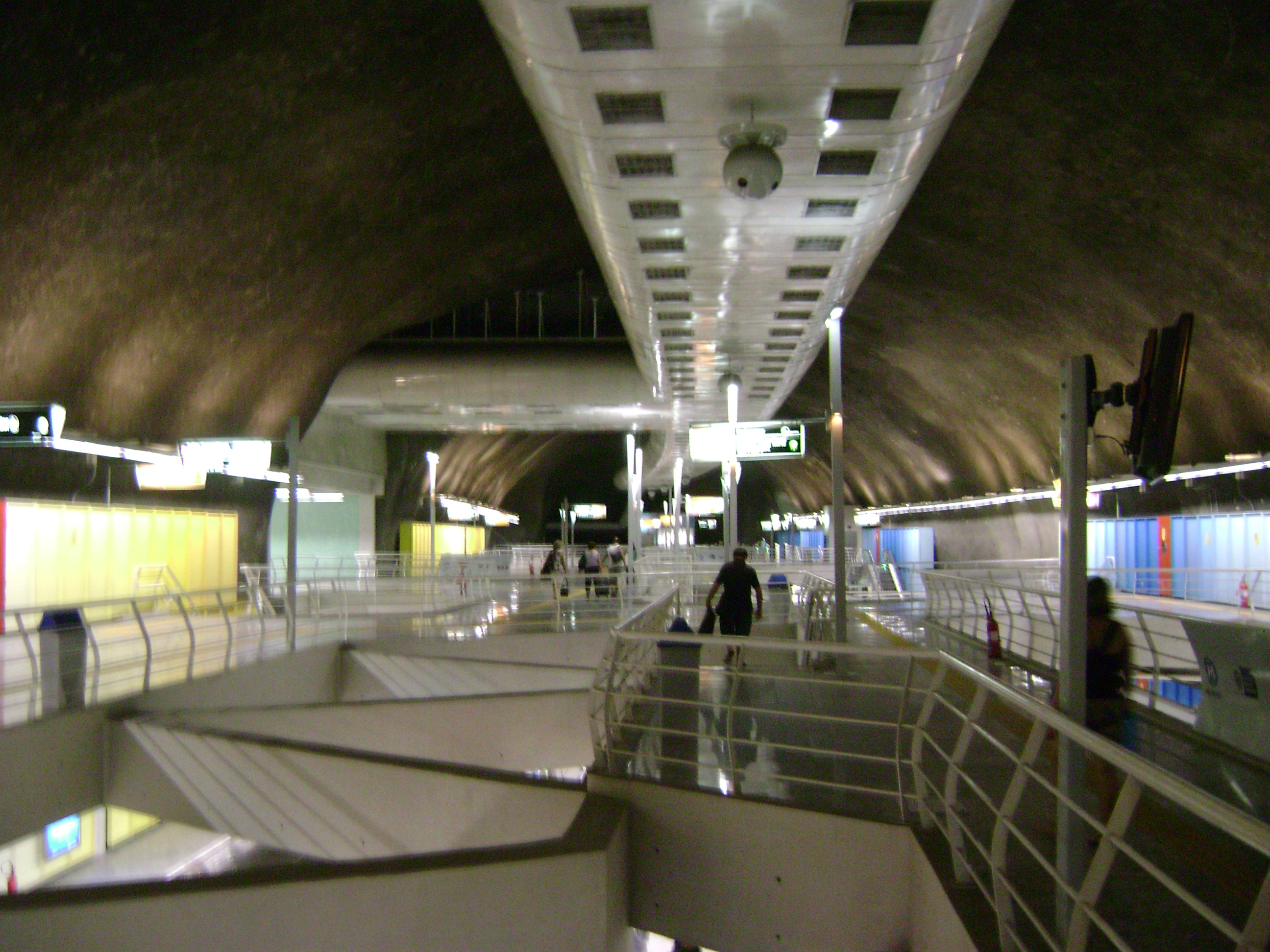 Estação de metrô Ipanema/General Osório, na cidade do Rio de Janeiro.